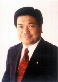 Senior Vice-Minister Takashi Tanihata